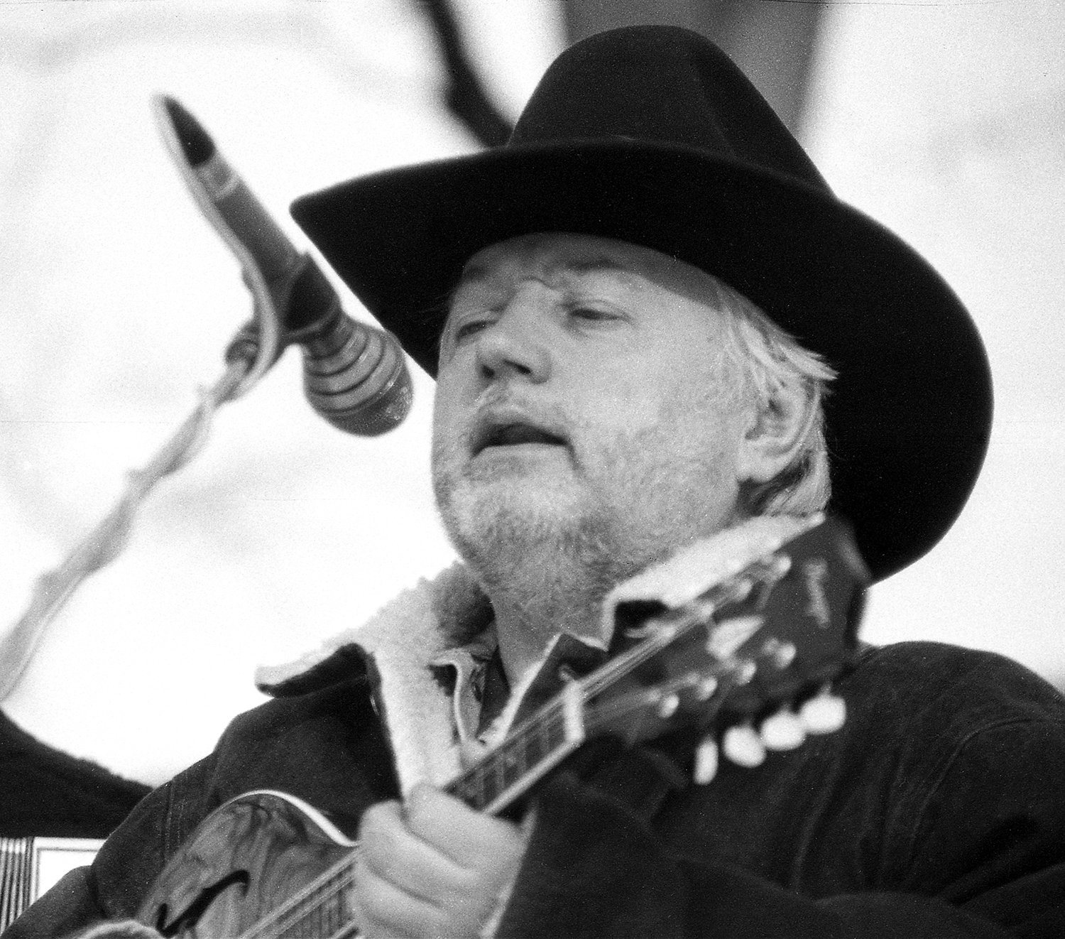 Taivo Linna 94